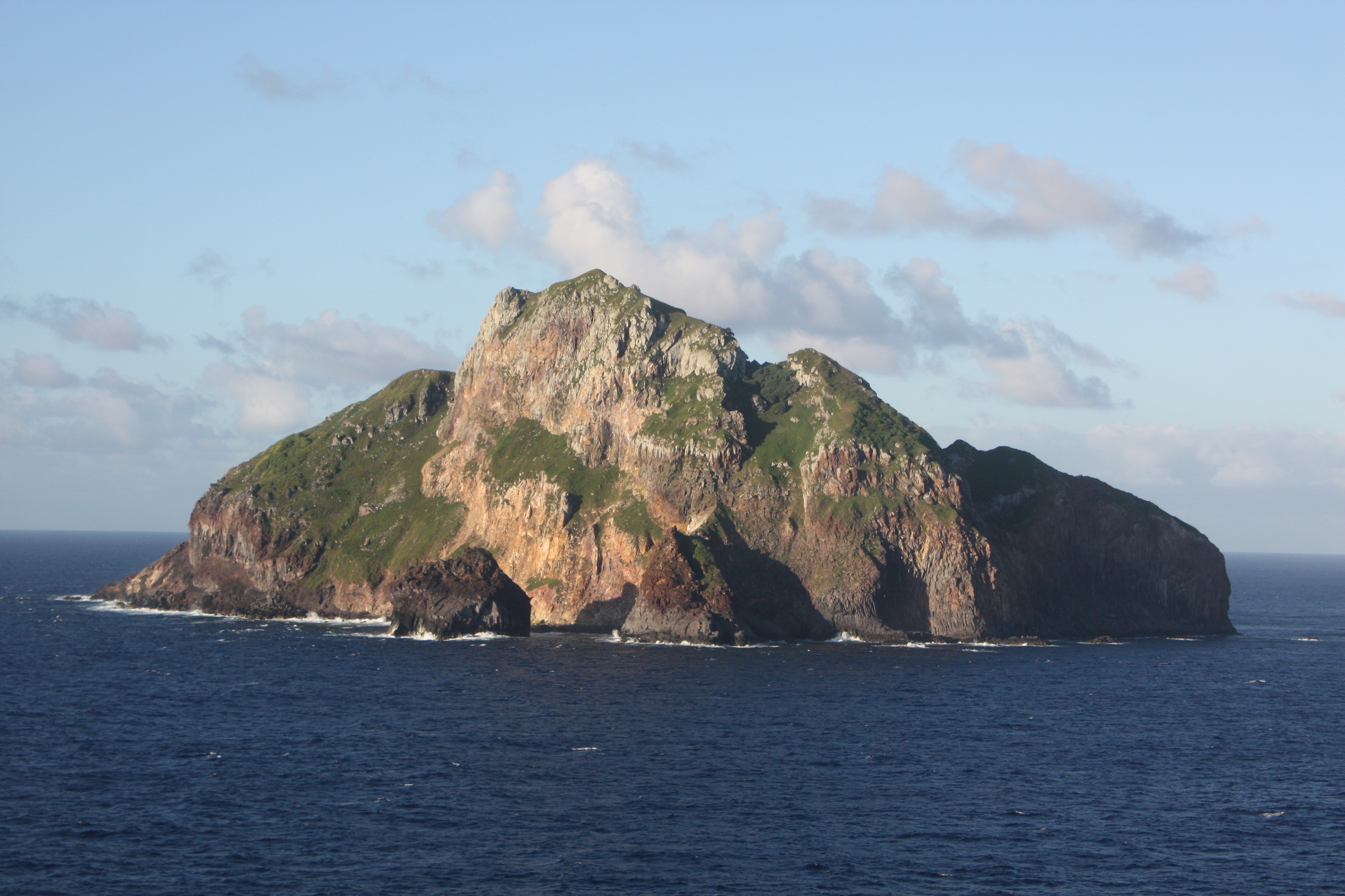 ile hunter